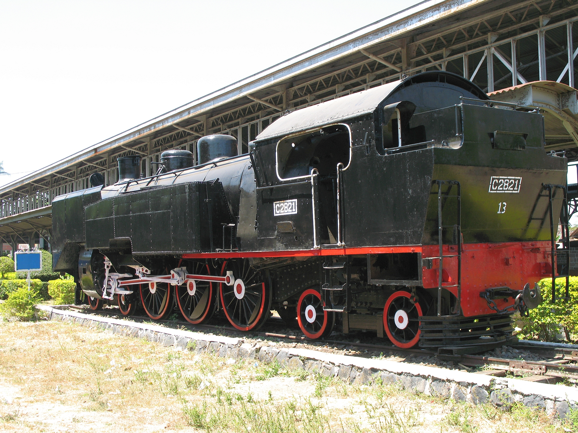 DKA C28 (28 21 D)